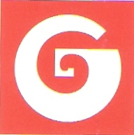 Logo van de Generale Bank